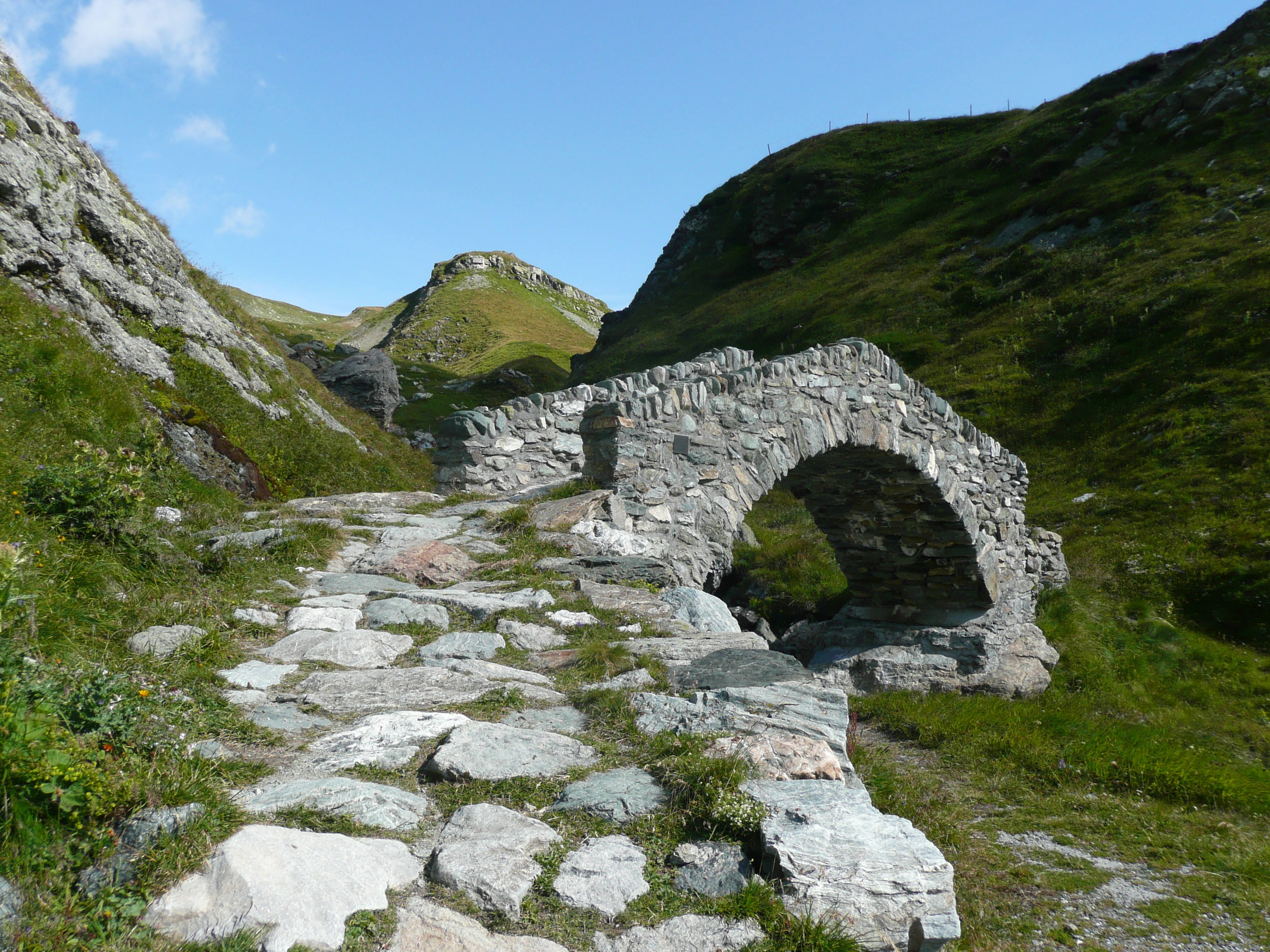 Brücke südlich vom Septimerpass (rätoromanisch Pass da Sett), Passo del Settimo, Sentiero Storico; Sperrstelle 1227: Felsenwerk Septimer Sporen A 7681